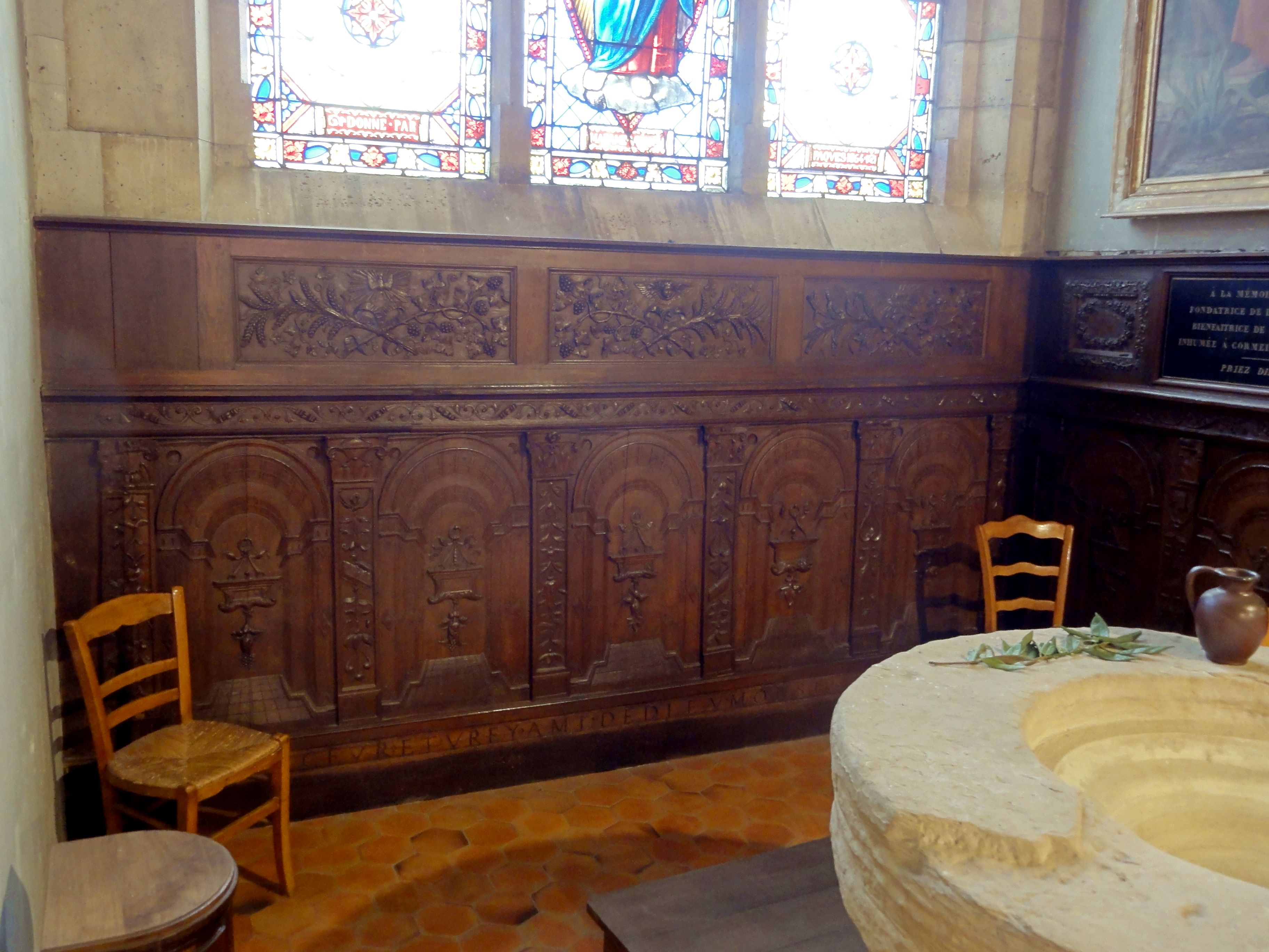 Boiseries de la chapelle des fonts baptismaux.